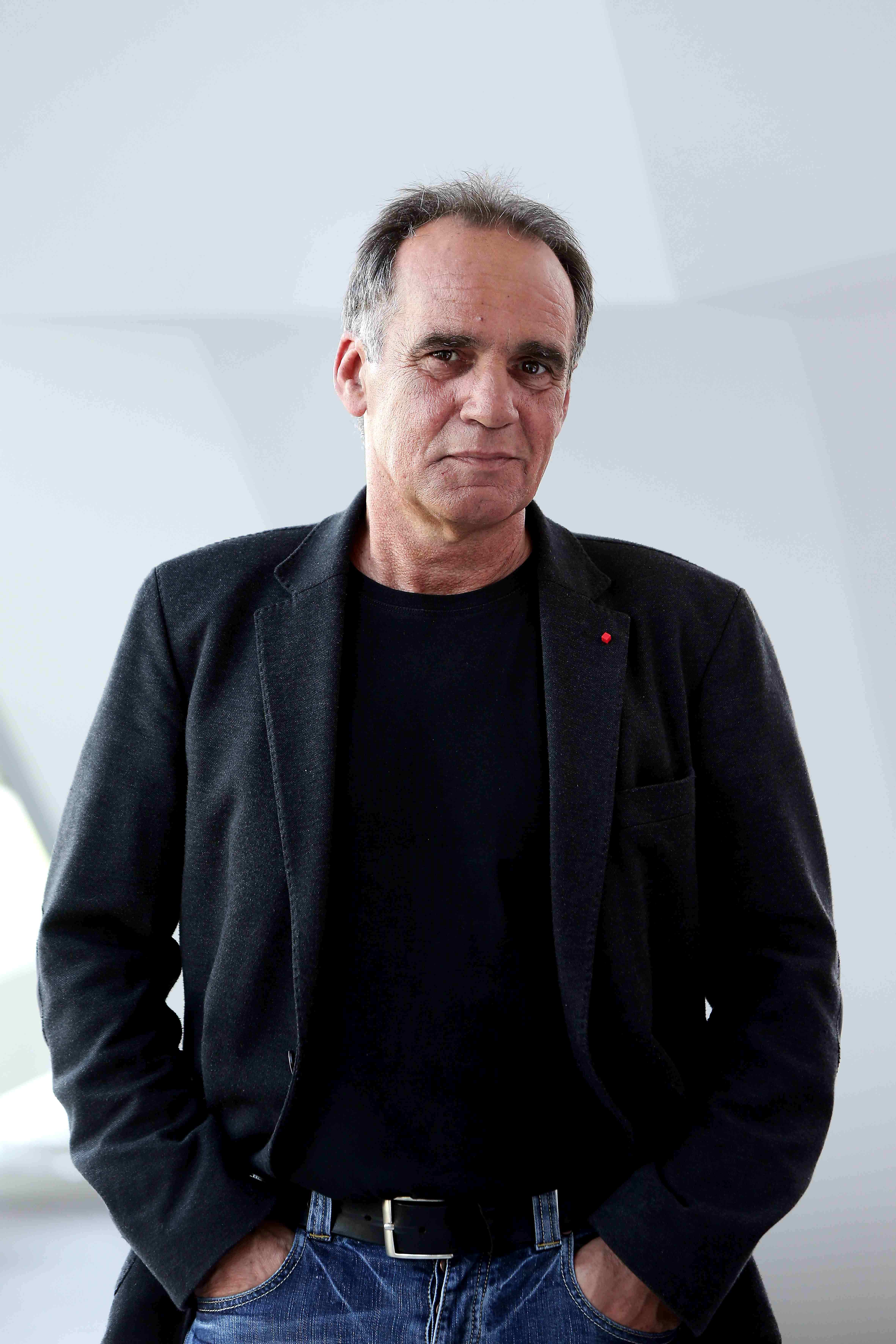 Oberösterreichischer Landtagsabgeordneter Hans-Karl Schaller SPÖ